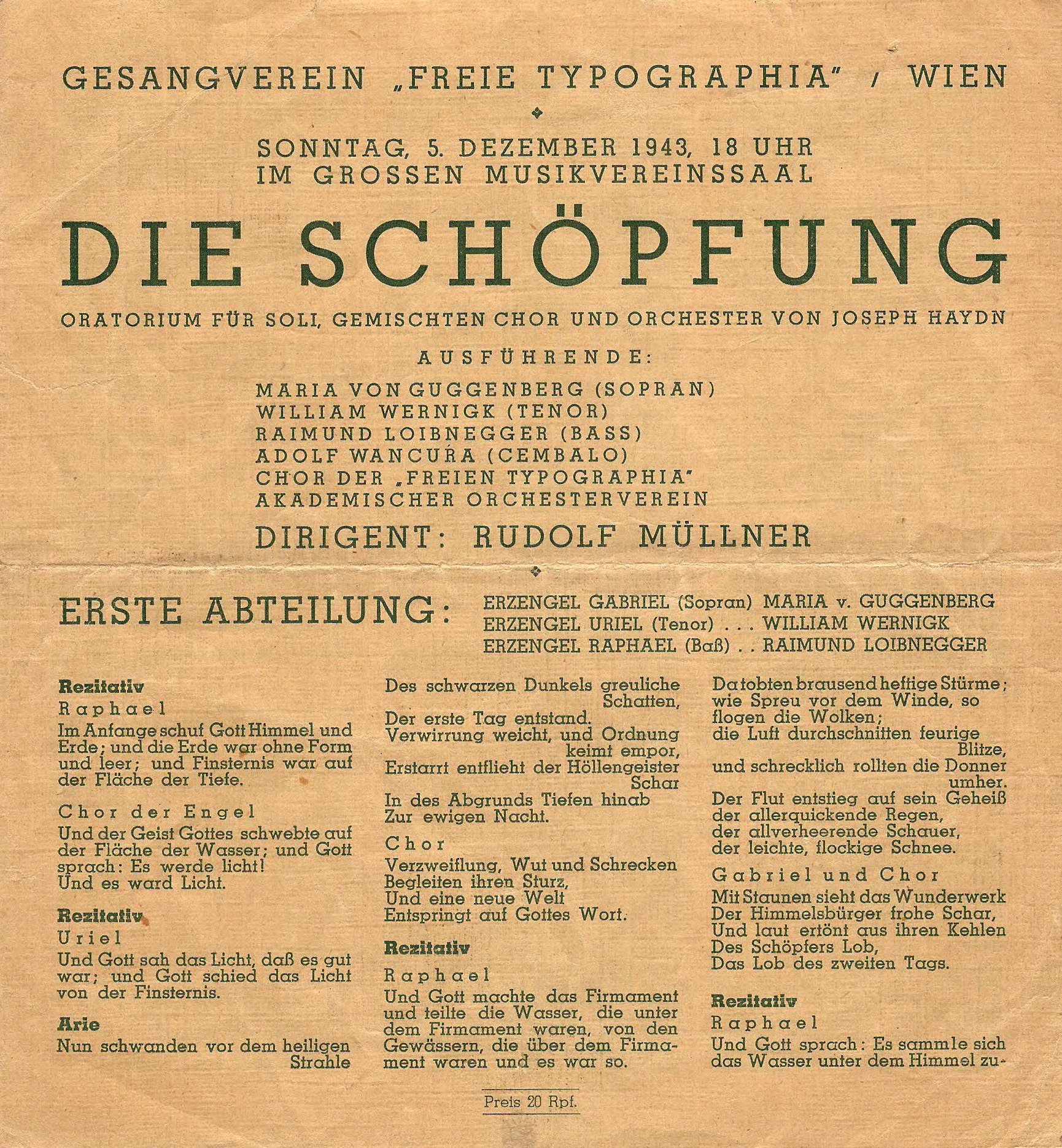 Plakat Gesangverein, Die Schöpfung, 05.12.1943